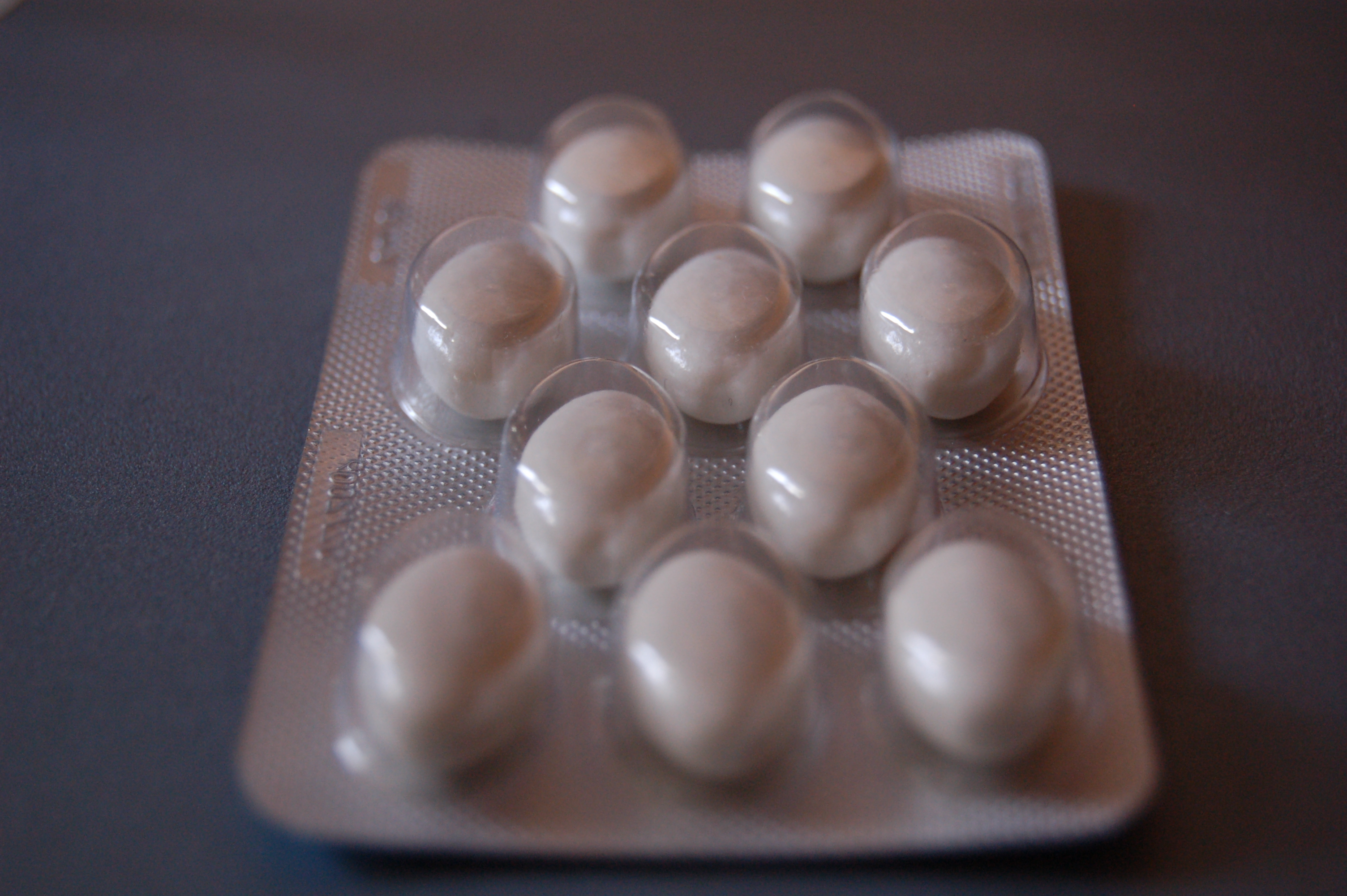 Blister de comprimés de Magné B6